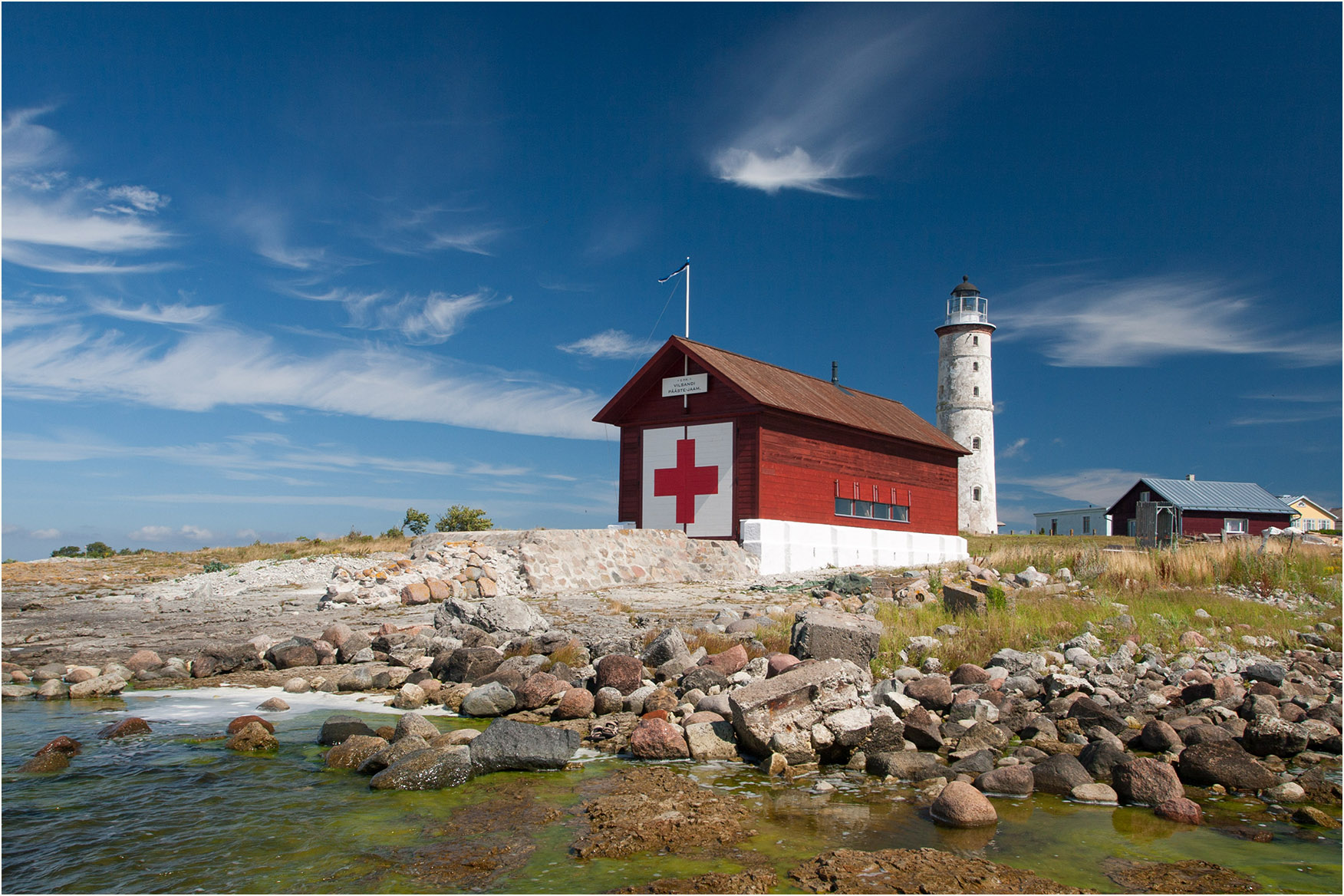 Vilsandi merepäästejaama puidust paadikuur